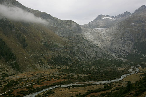 Rhonegletscher (Gletschertrog ohne Eis) mit Rhone